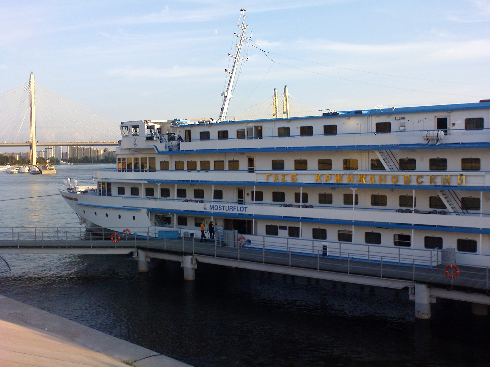 Теплоход проекта 302М